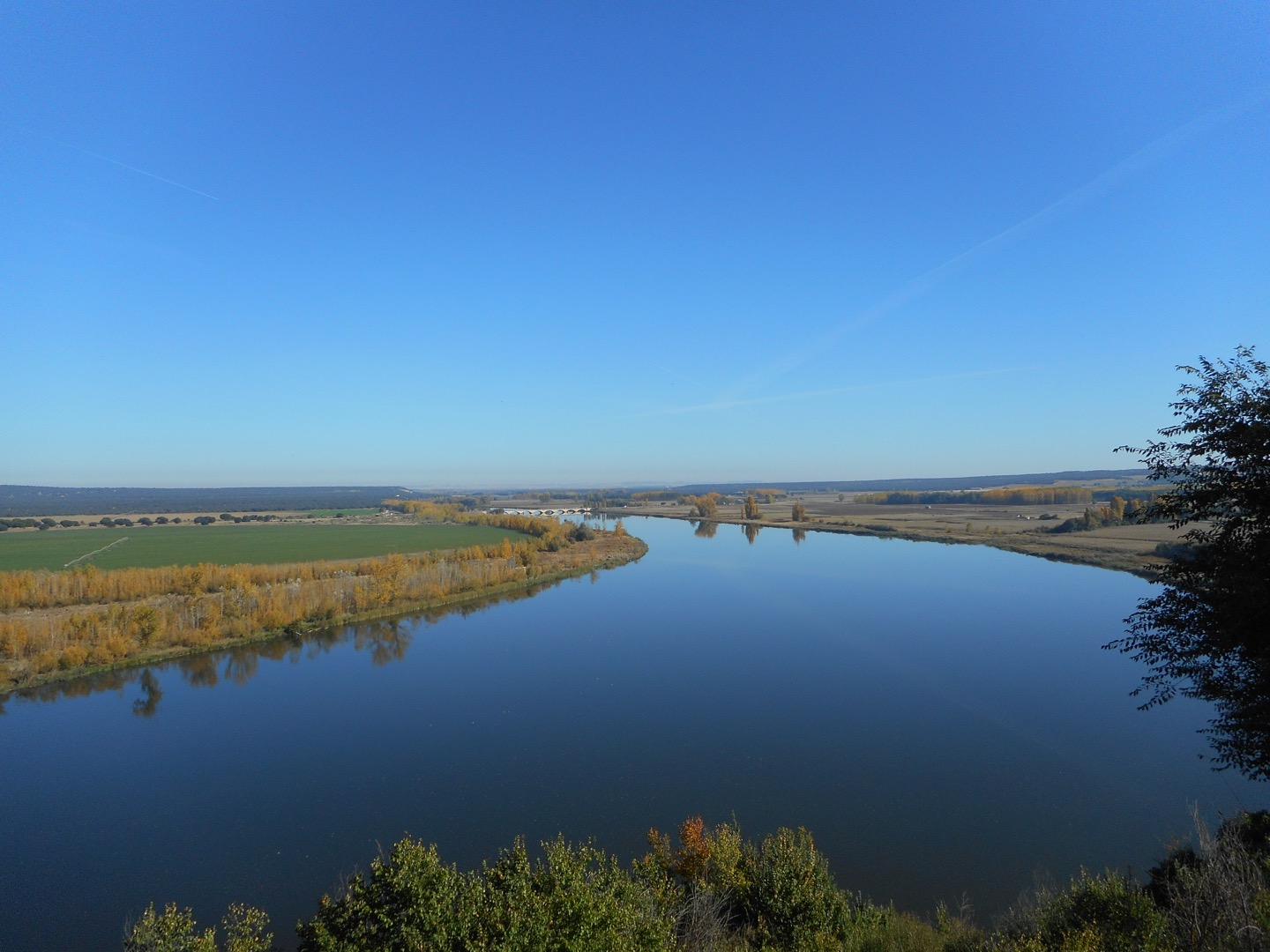 Ribera del Duero en Castronuño desde el mirador de la Muela This is a photography of a Site of Community Importance in Spain with the ID: ES4180017. Natura2000 entry, EEA entry